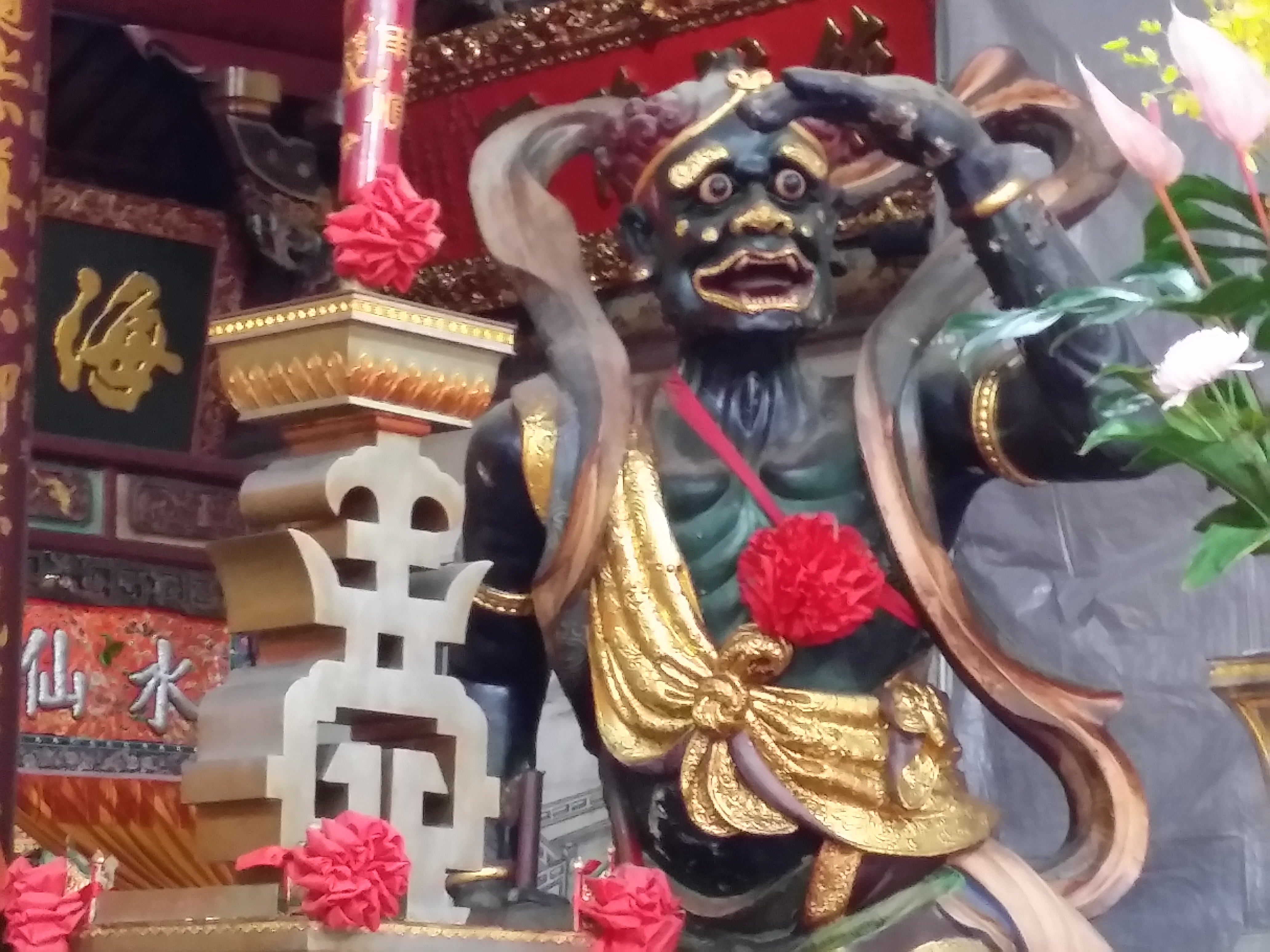 大天后宮順風耳（水精將軍）